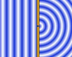 Vlneni pri pruchodu bodovou sterbinou (k demonstraci difrakce)